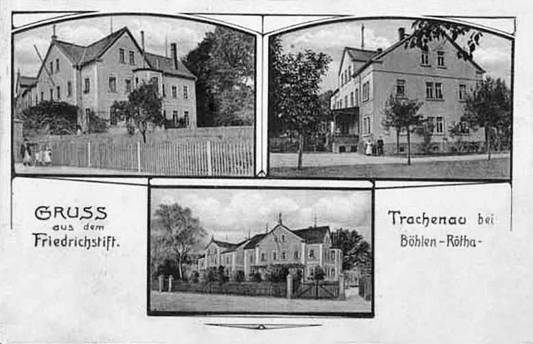 Friedrichstift in Trachenau bei Böhlen